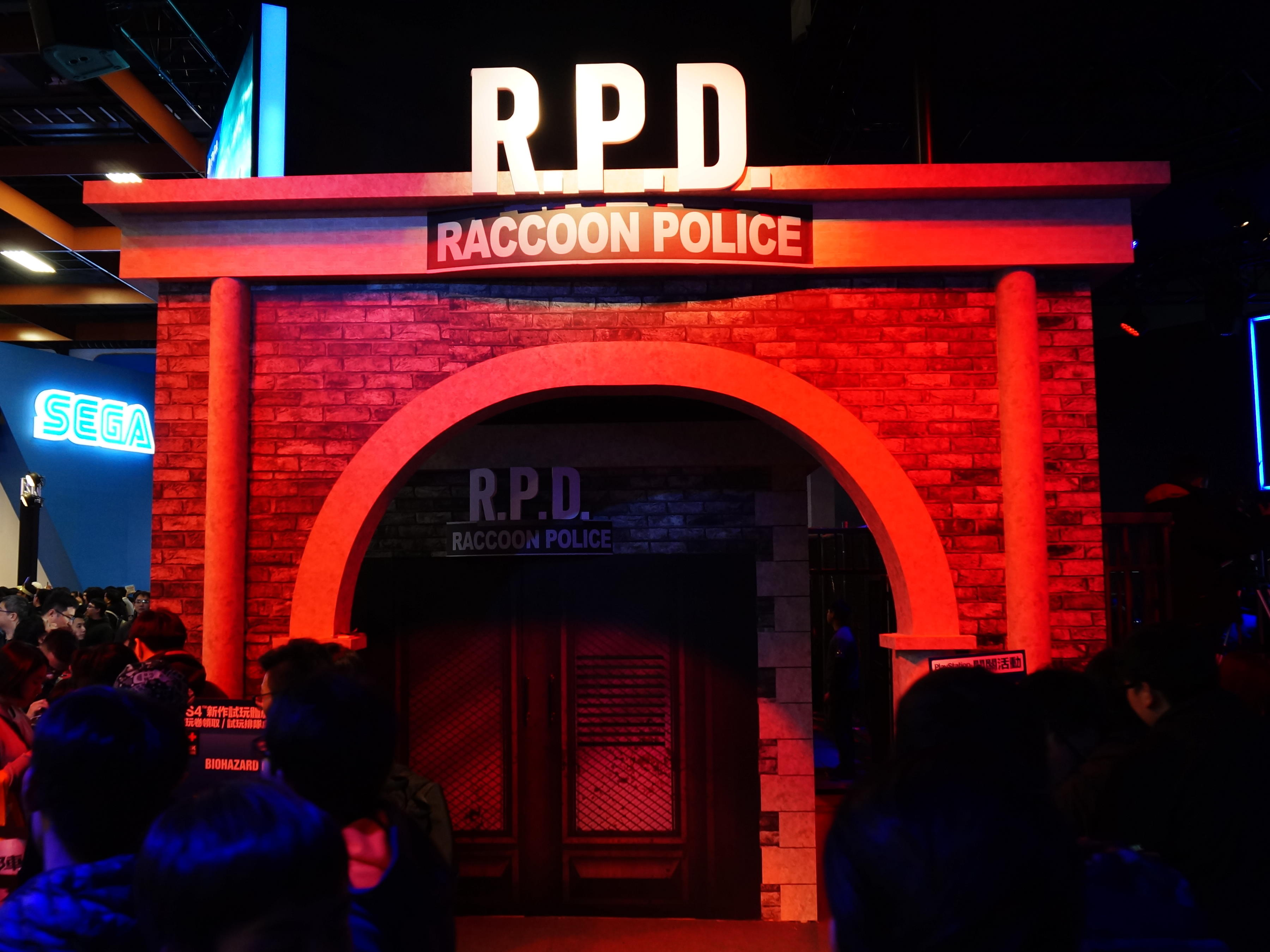 2019台北國際電玩展世貿一館展區，台灣索尼互動娛樂攤位，《惡靈古堡2 重製版》試玩區。